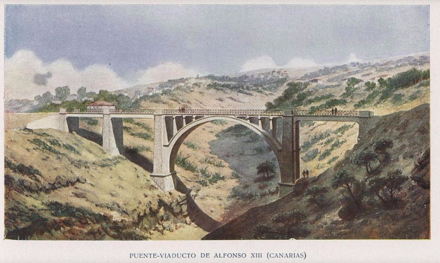 Puente de Hierro o de Alfonso XIII entre las localidades de Santa Úrsula y La Victoria de Acentejo en la provincia de Santa Cruz de Tenerife, según dibujo del catálogo de José Eugenio Ribera